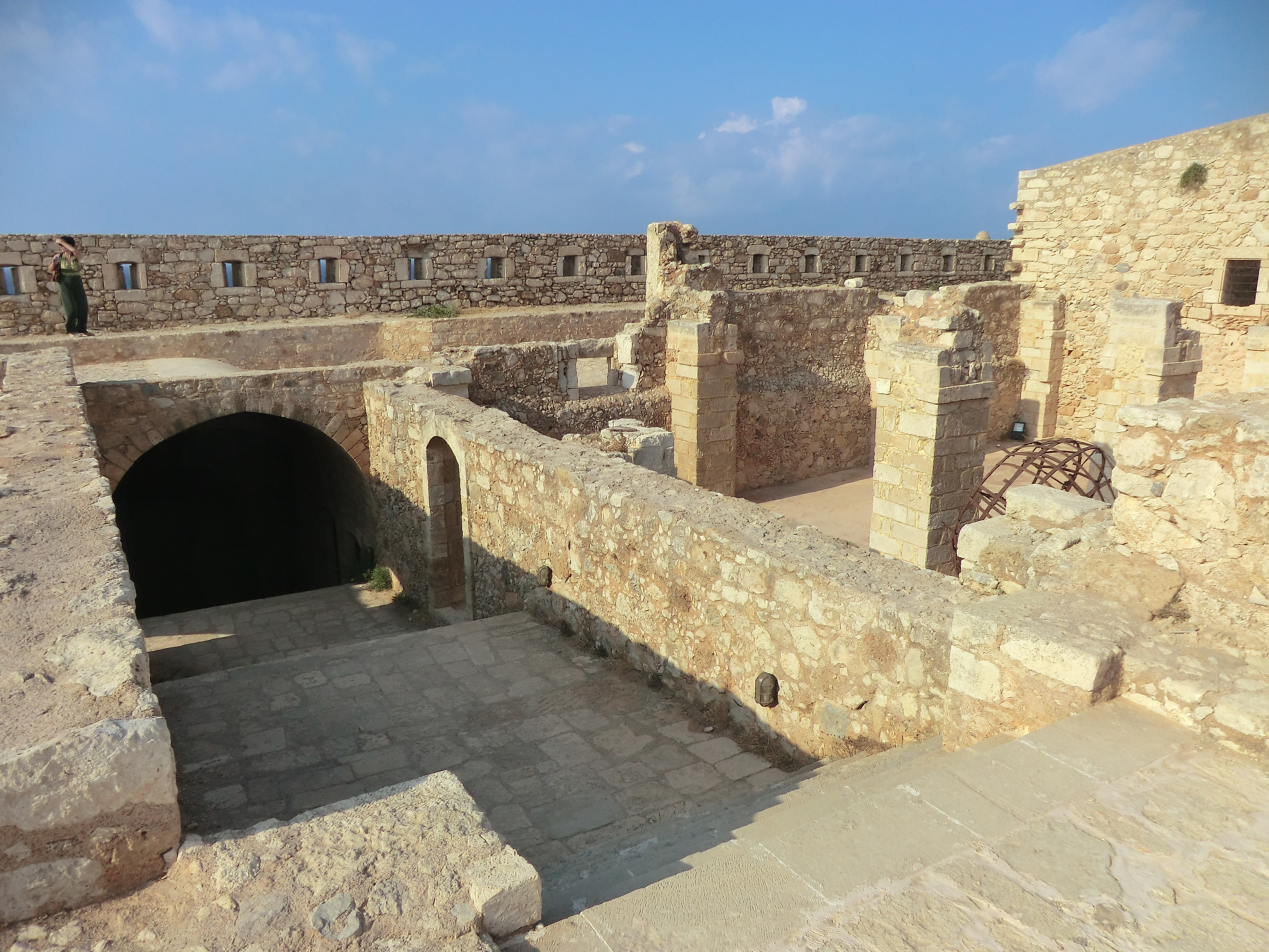 Vue de la forteresse à Réthymnon.